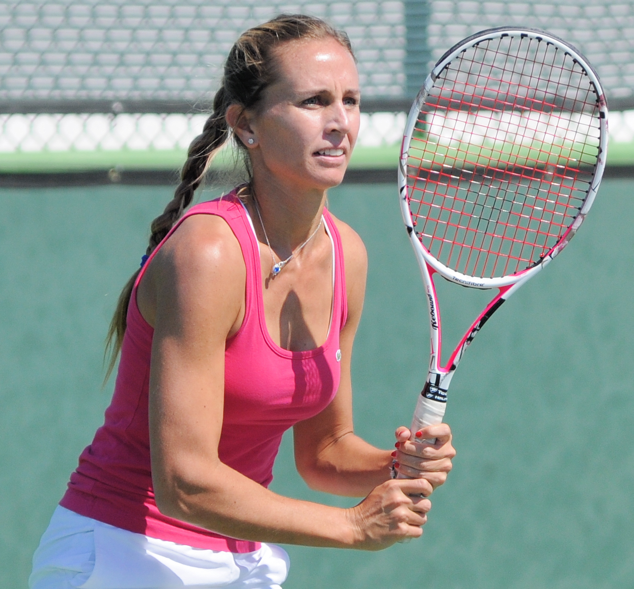 BNP Paribas Open 2012